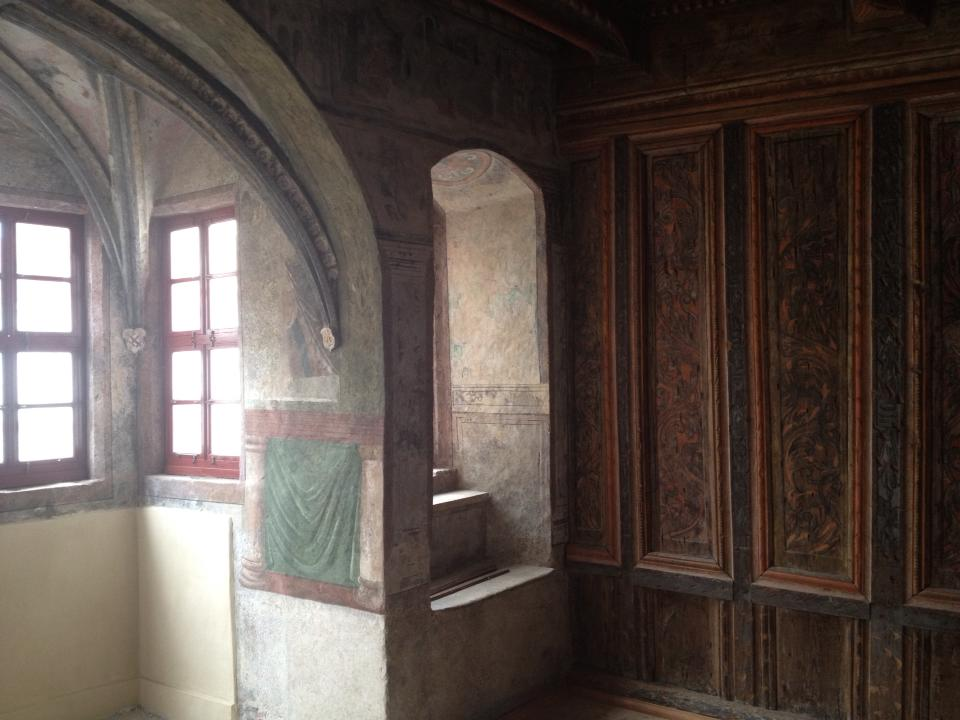 Lutherhaus in Neustadt an der Orla, Stube mit historischer Wand- und Deckenvertäfelung